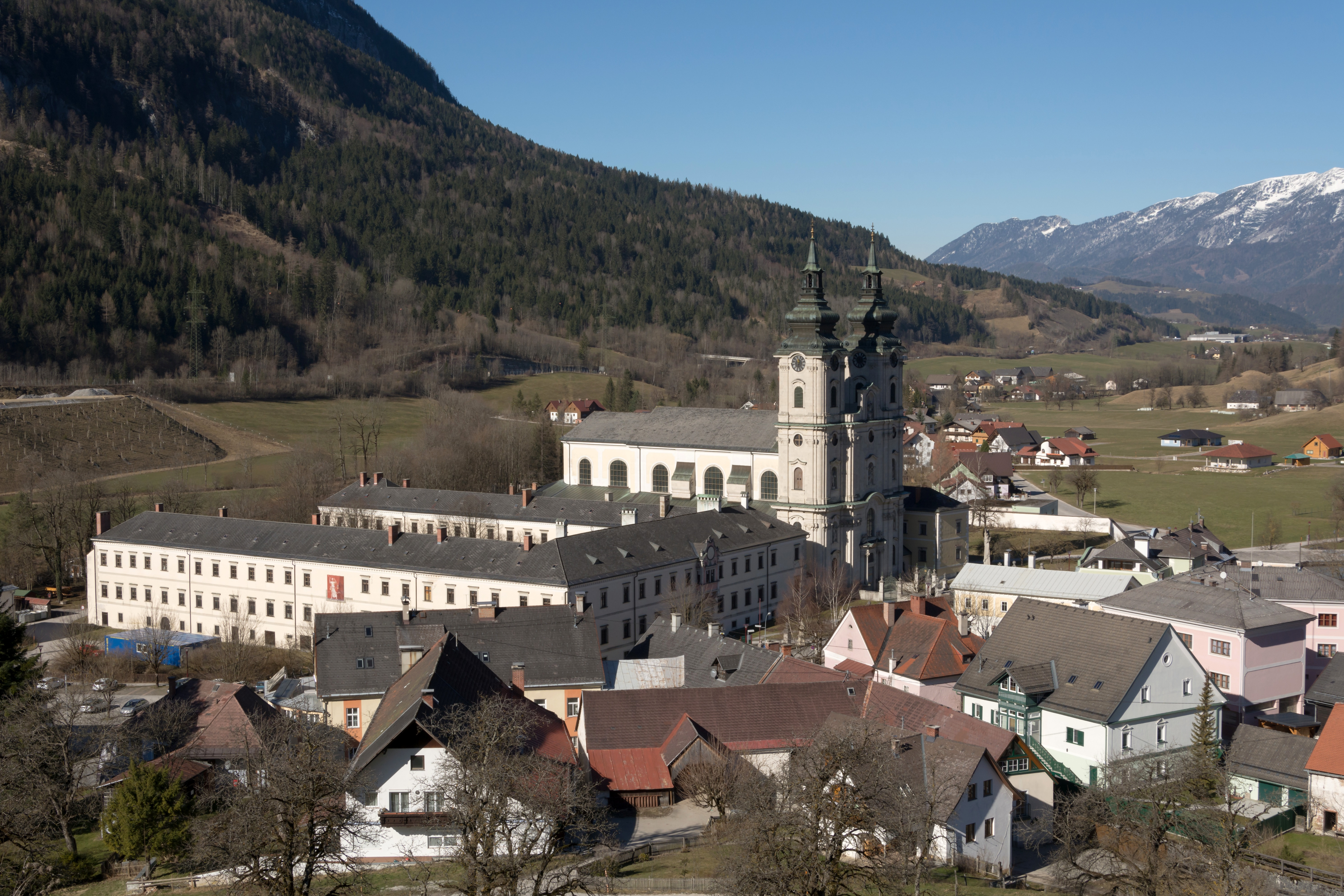 Gesamtanlage ehem. Stift Spital am Pyhrn